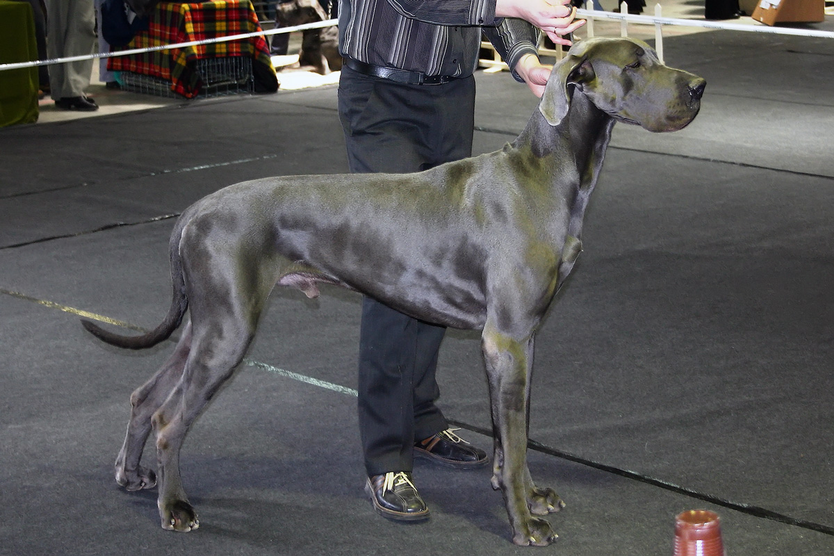 Lengvo tipo melinas Vokiečių Dogas